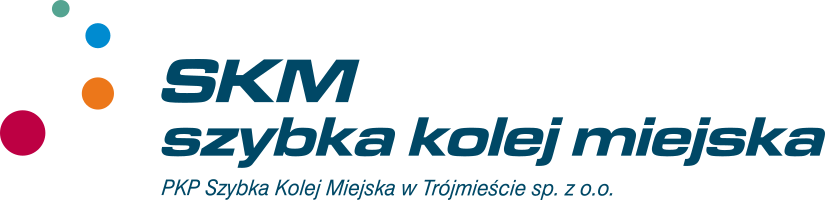 Nowe logo PKP SKM w Trójmieście.